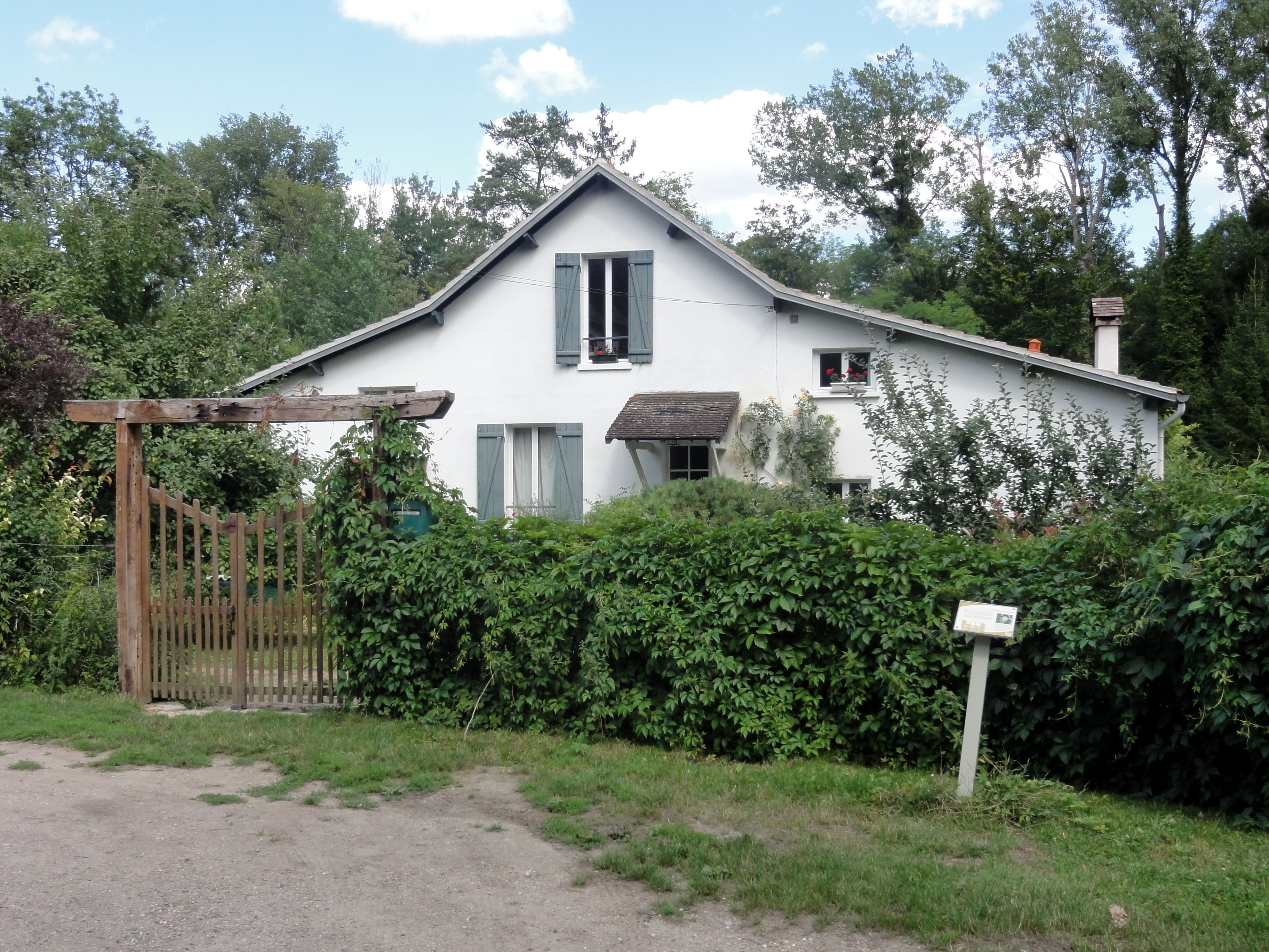 Maison de Maurice de Vlaminck, chemin de la halte de la Naze.